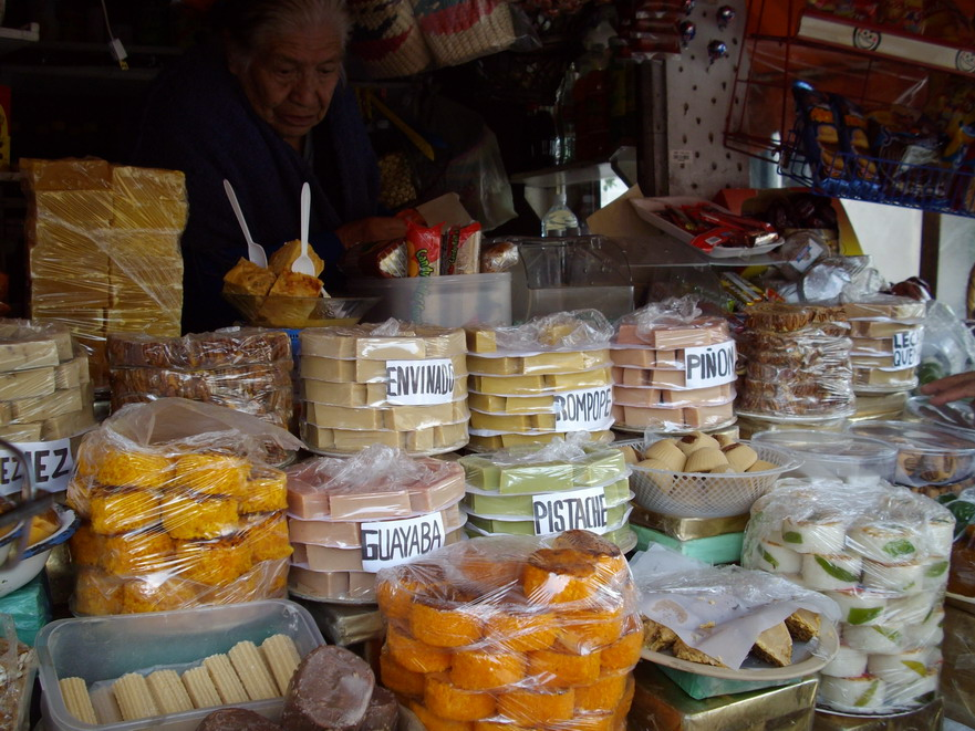 Tienda de dulces en los portales de Toluca (México)